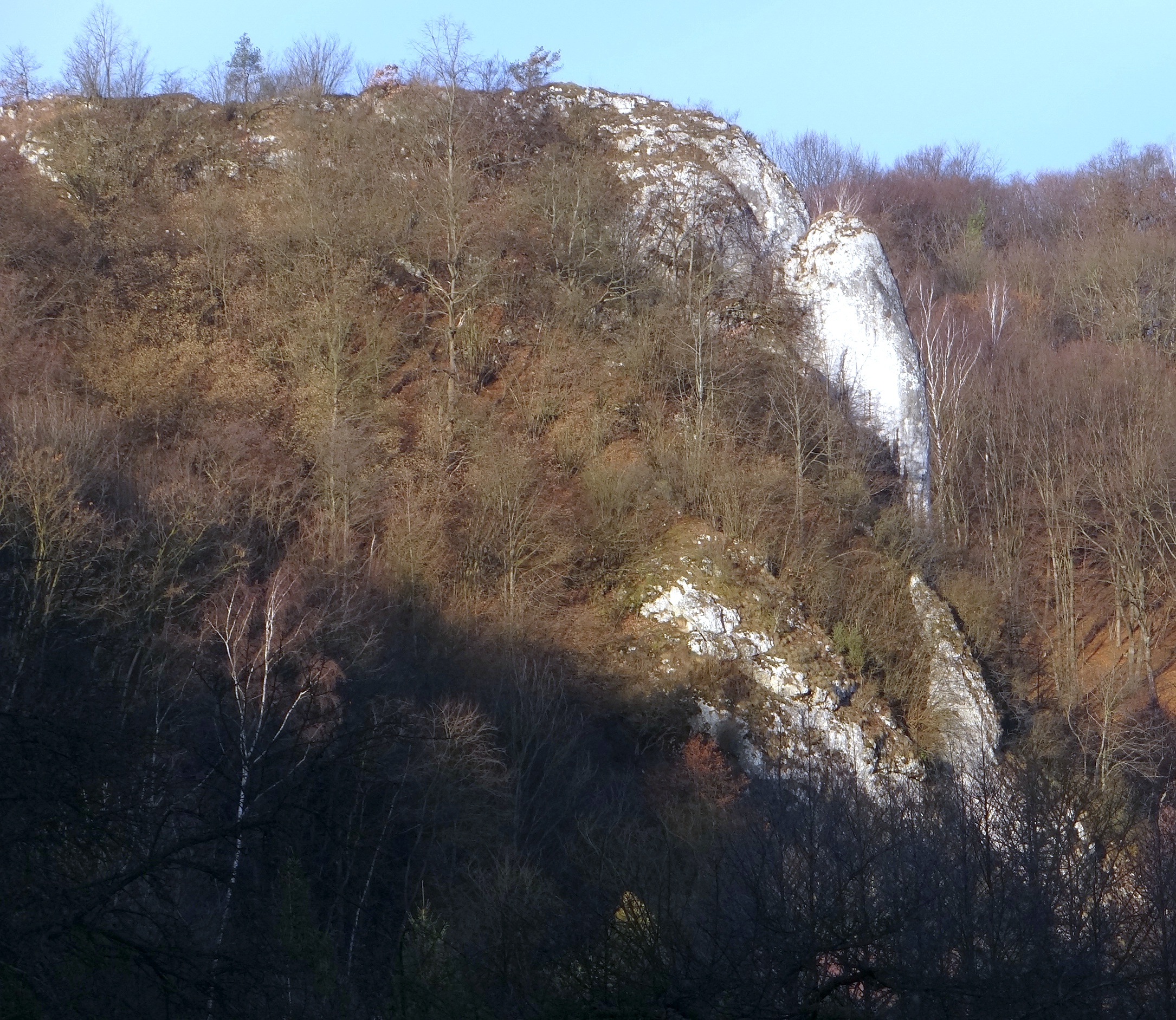 Łysina w Zimnym Dole. Widok od północnego wschodu